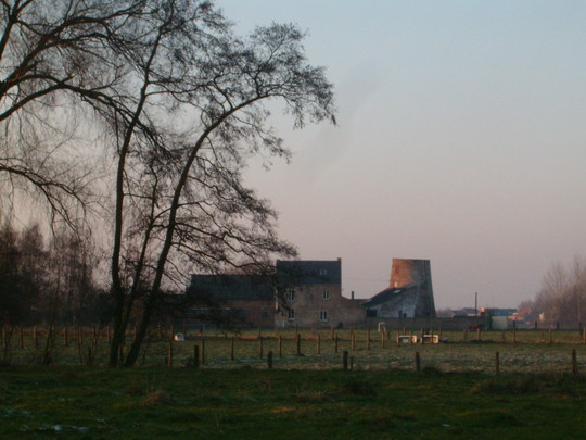 Molen Mazelkouter